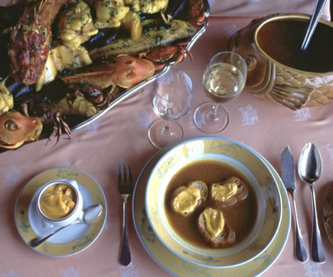 Plat de bullabessa amb torradetes de pa untades amb salsa rolla, acompanyada de vi blanc i dels peixos que en principi es mengen desprès. Aquesta és una versió de luxe del plat tradicional.